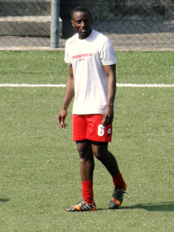 Kewullay Conteh, calciatore sierraleonese